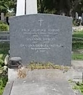 Leopold Dubois-Wiener Zentralfriedhof (12B-16-12)